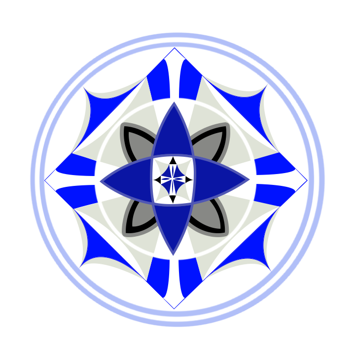 Escudo de la casa de Melian la Maia